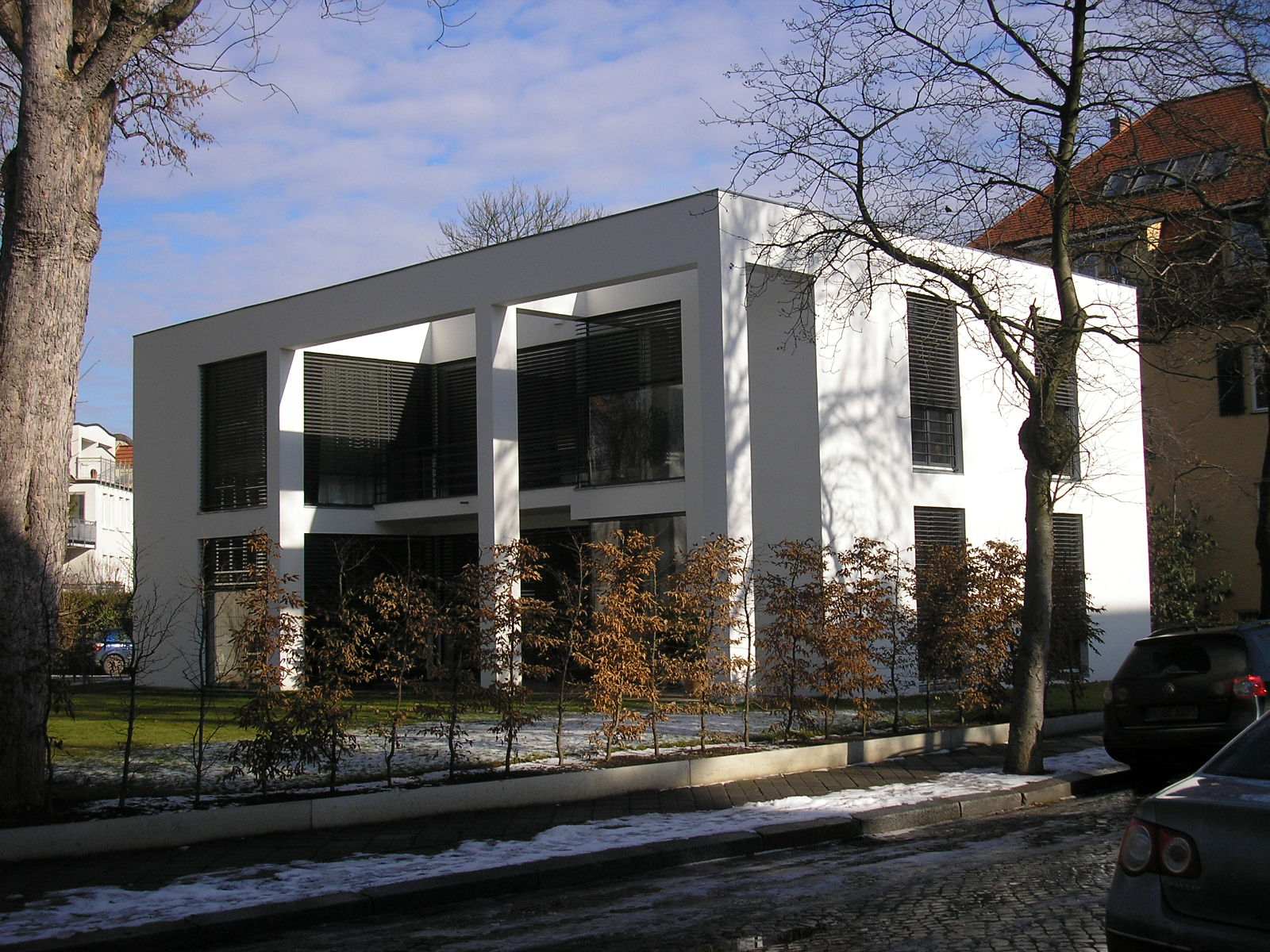 Ein modernes Eigenheim in der Reichartstraße in Erfurt (Thüringen).